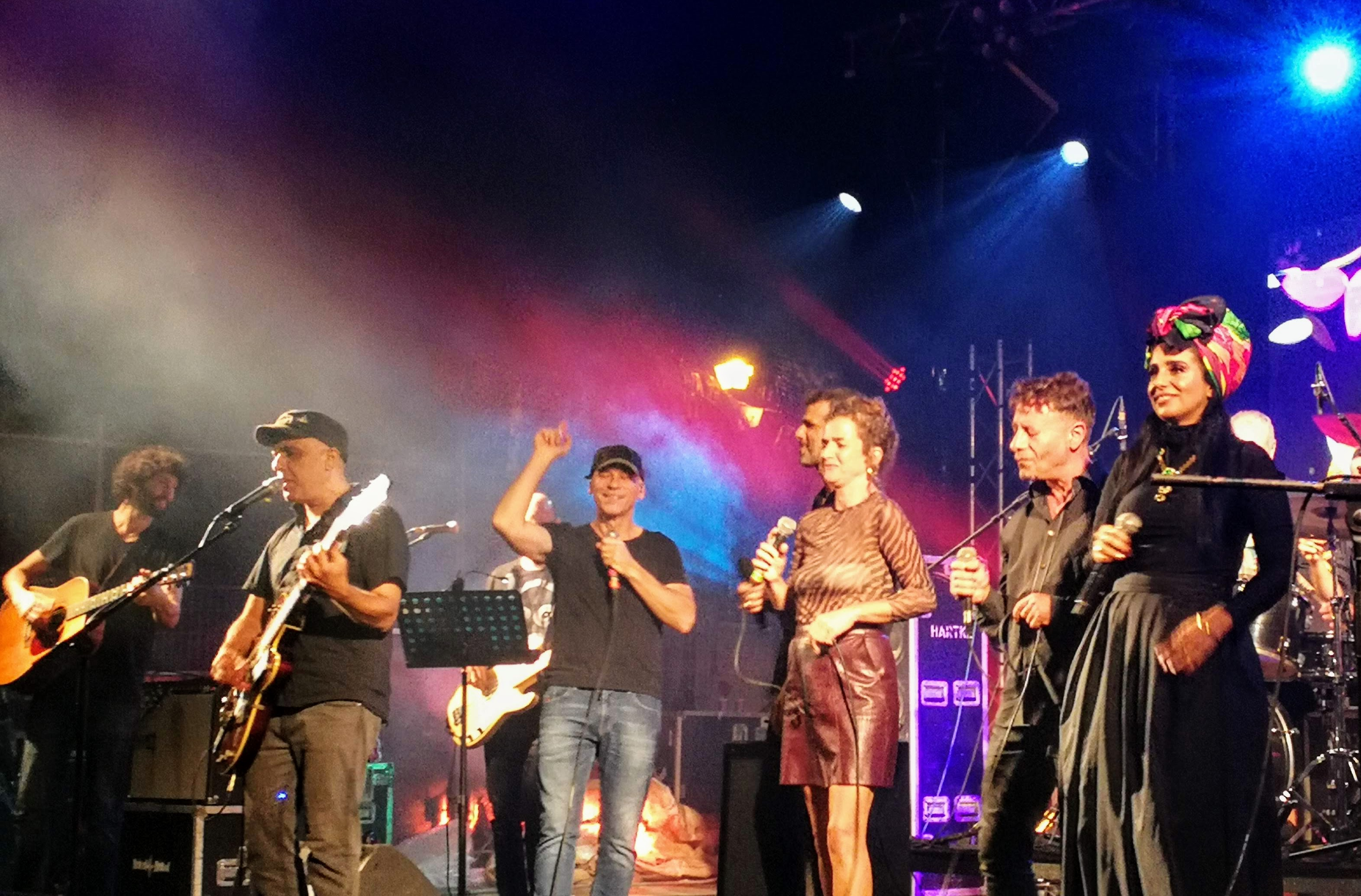 כמה אהבה- שרים מאיר בנאי. הפקת מקור שהתקיימה במסגרת "פסטיבל בנימינה ליצירה ישראלית", בהשתתפות: ארז לב ארי, נרקיס (זמרת), עידן רפאל חביב, עלמה זהר, ערן צור, קובי אפללו, רונה קינן ורמי קלינשטיין בביצועים לשירים של מאיר בנאי ז"ל. מנחה: יואב קוטנר. ניהול מוסיקלי: צח דרורי ויהוא ירון. המופע התקיים באמפי דשא, יד לבנים, בנימינה.